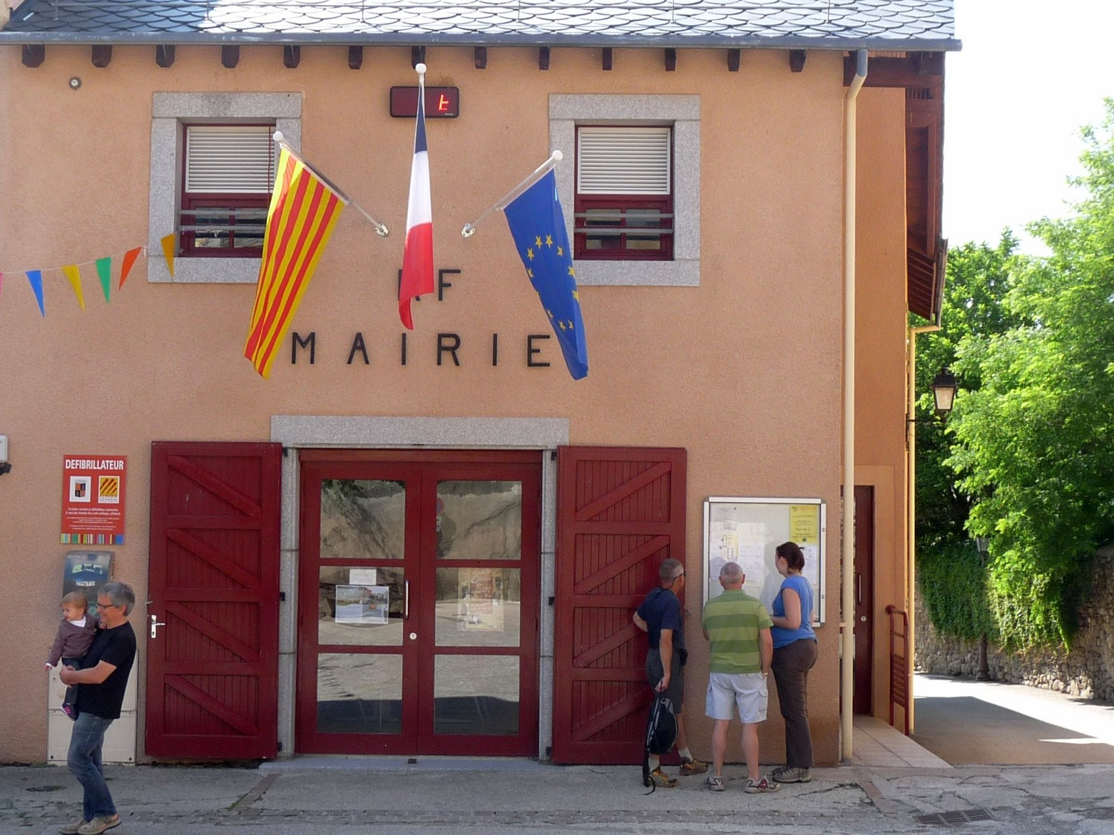 Mairie de Latour-de-Carol Pyrénées-Orientales, France